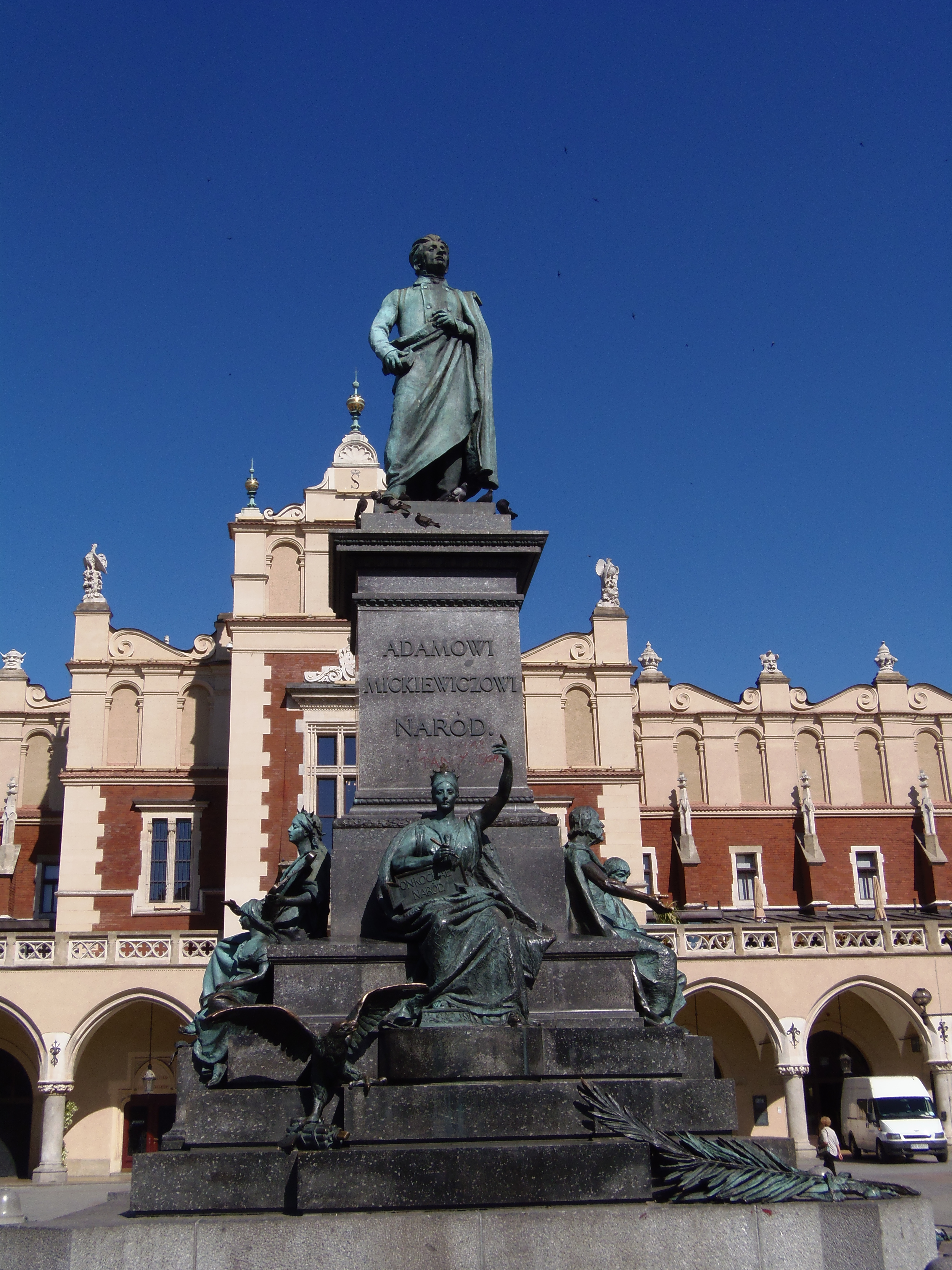 zdjęcia z największych miast